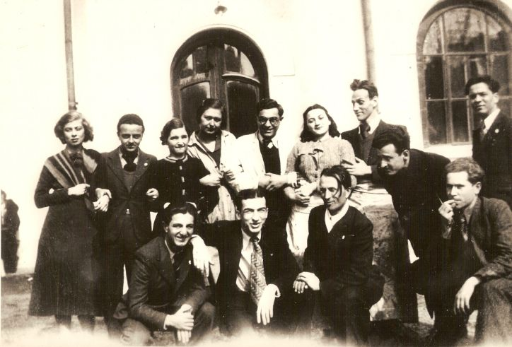 Gheorghe Ghițescu între studenții săi de la Universitatea de Arte Frumoase Nicolae Grigorescu din București. Fotografia se află în Arhiva Universității de Arte Frumoase Nicolae Grigorescu din București.